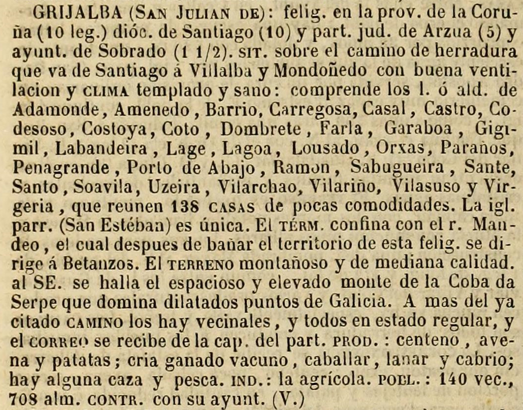 Grixalba no Diccionario geográfico-estadístico-histórico de España y sus posesiones de Ultramar.